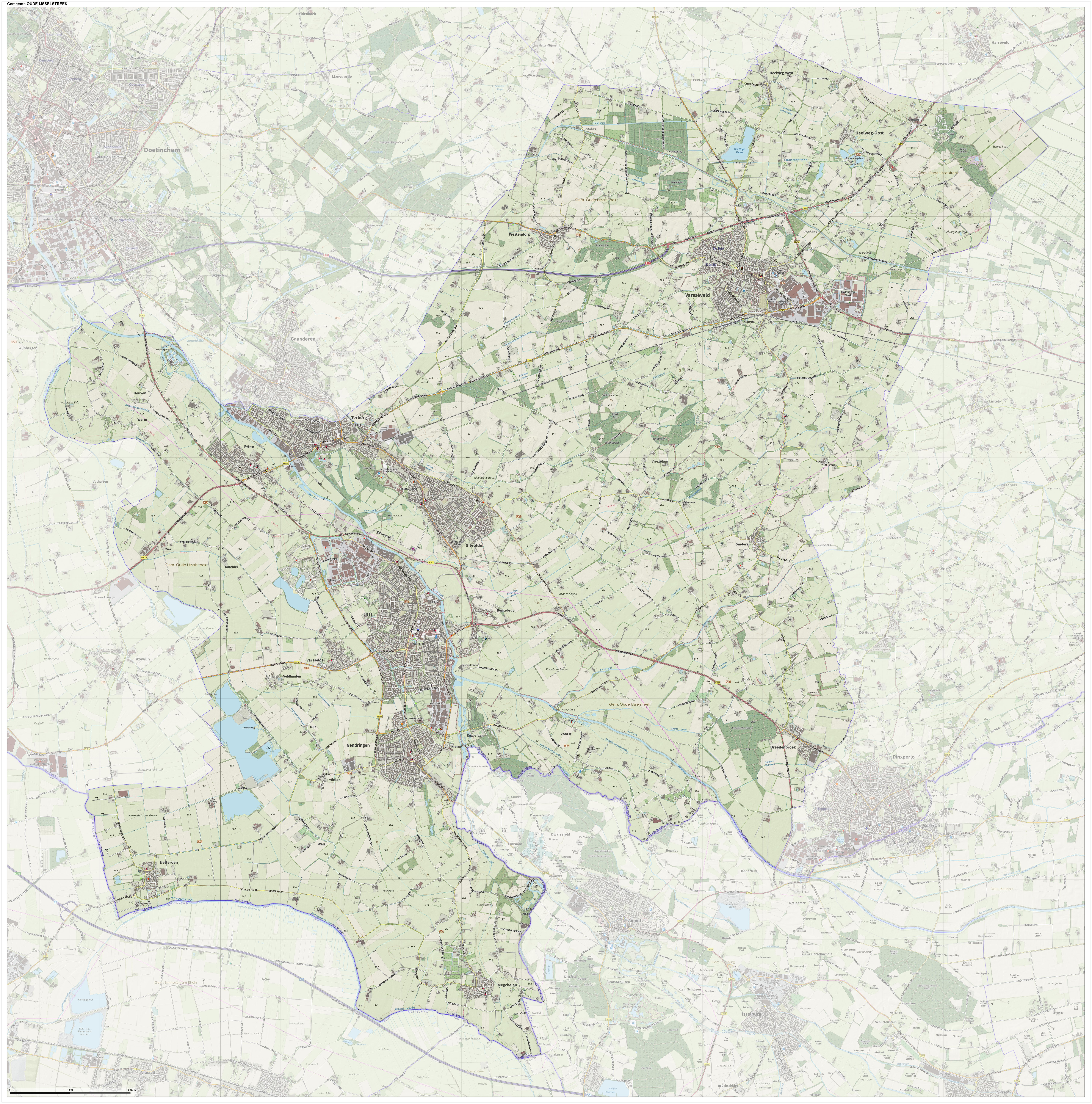 Topografische gemeentekaart. Resolutie: 300 pixels/km. Kaartbeeld samengesteld uit de open geodata van de Top10NL en Top25namen (Kadaster), Creative Commons-BY licentie. Gebouwvlakken uit open geodata BAG extract. Wegen uit de OpenStreetMap, OpenStreetMap community. Reliëfschaduw uit de Actuele Hoogtekaart AHN2. Samenstelling en kleurenschema: Jan-Willem van Aalst, met QGIS. Zie ook de Legenda.